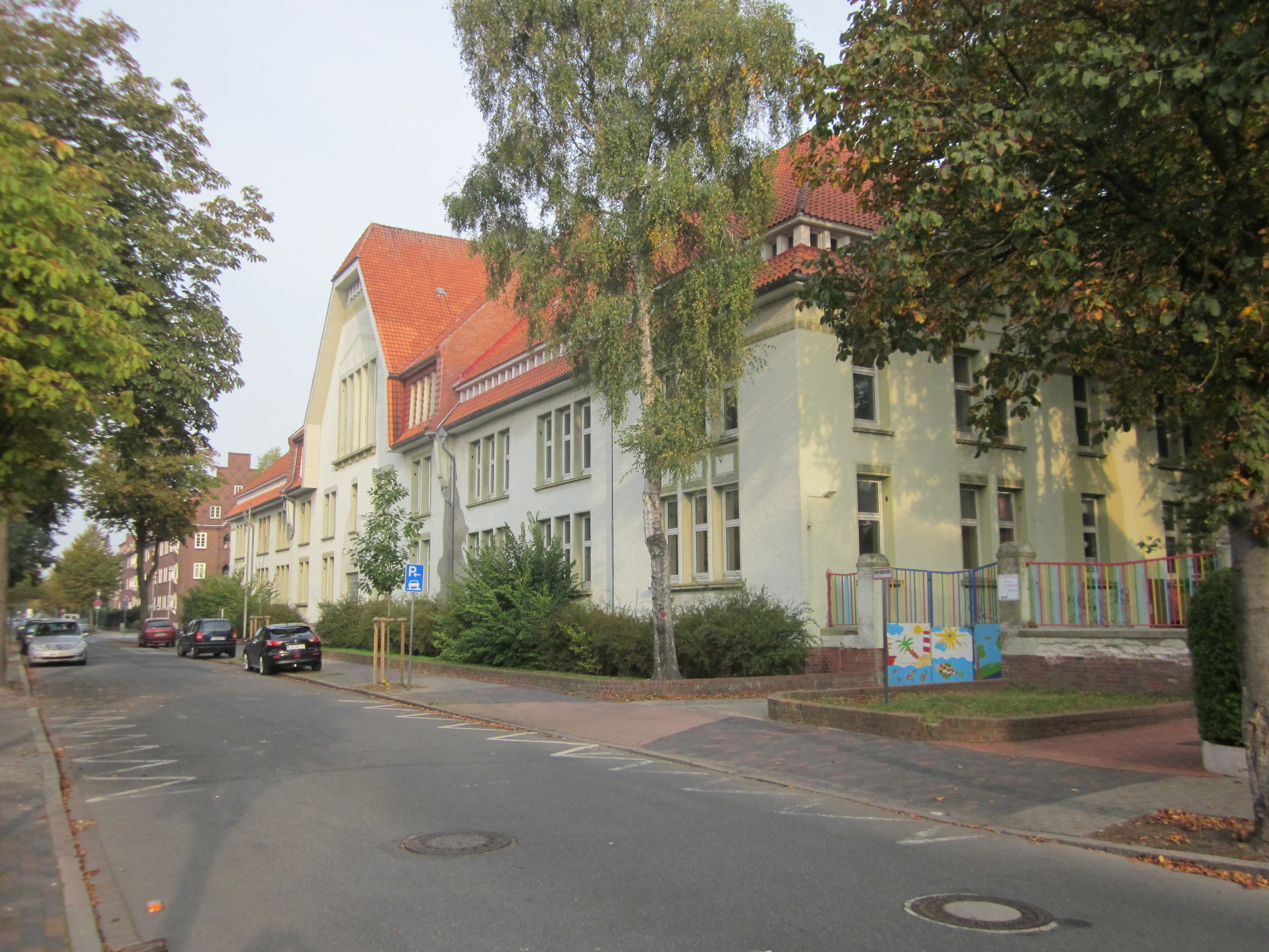 Ehemalige Gorch-Fock-Schule in Cuxhaven, ursprünglich eine Kaserne